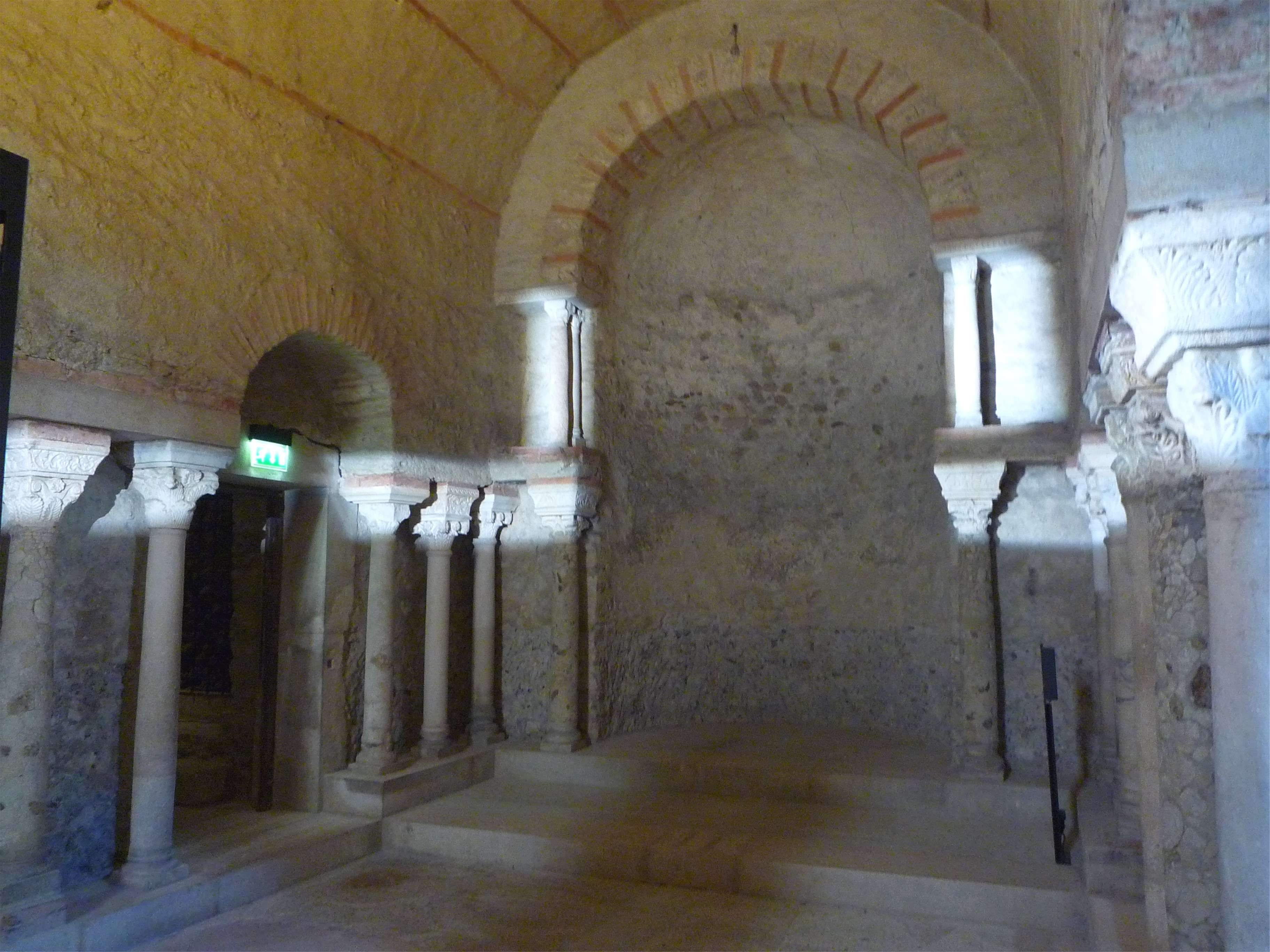 Crypte Saint-Oyand (VIe siècle) et sa colonade (VIIe siècle) au musée archéologique de Grenoble.